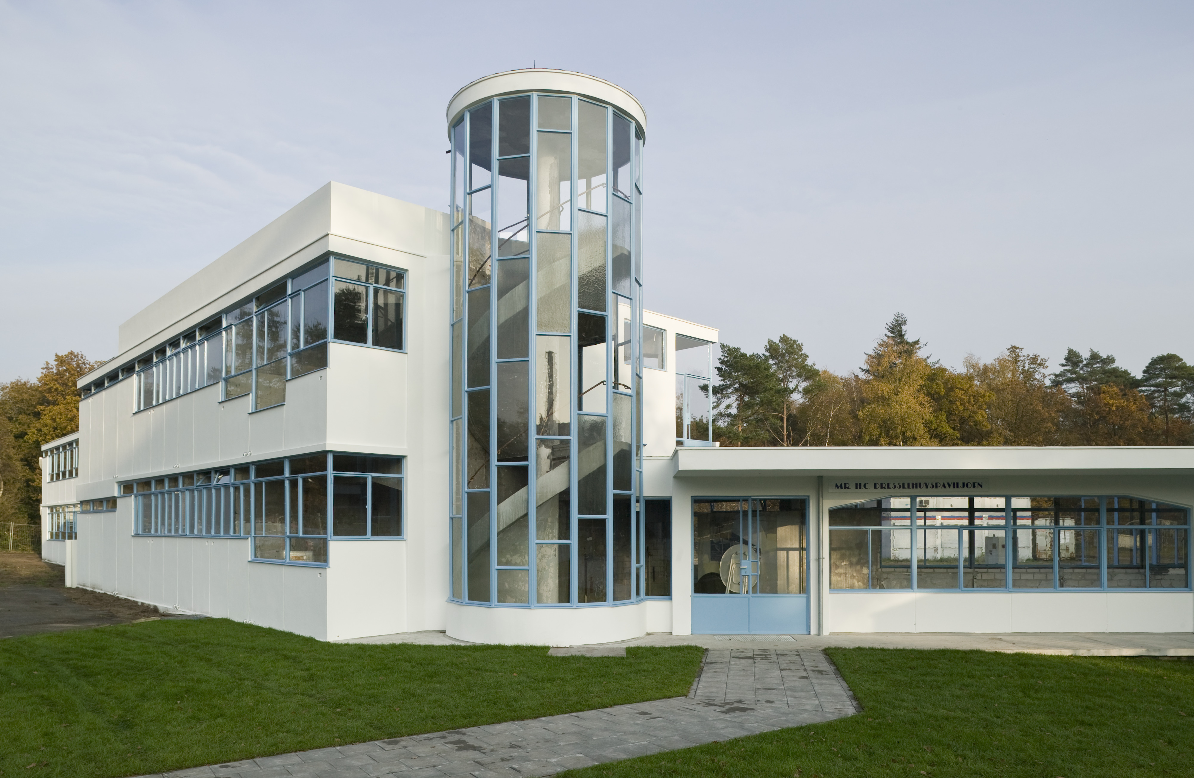 vm Sanatorium Zonnestraal: Mr.M. C. Dresselhuyspaviljoen, overzicht van de zuidvleugel, dan wel scheeve vleugel, tijdens restauratie